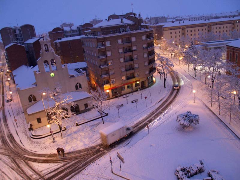 Entorno de la iglesia de San Cristobal, de Vitoria, la noche del 20 de marzo de 2007